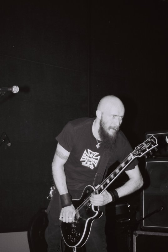 New Model Army en concert au Big Band Café, Caen/Hérouville Saint-Clair